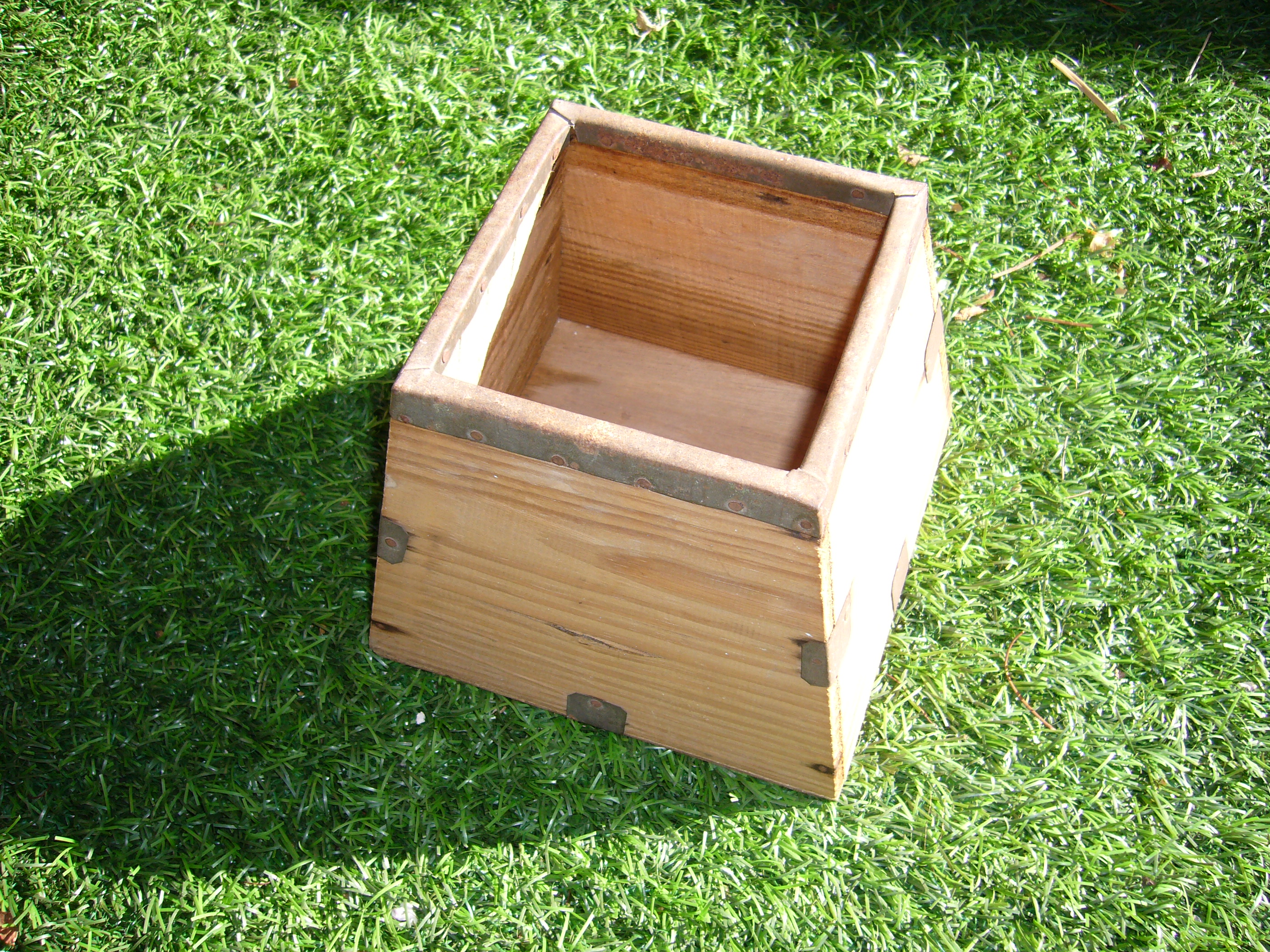 un mig almud